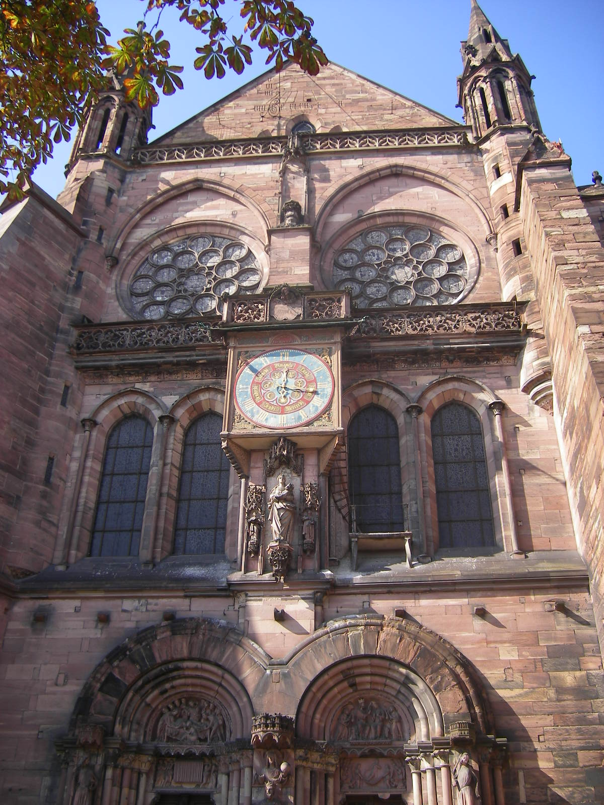 Cathédrale Notre-Dame de Strasbourg